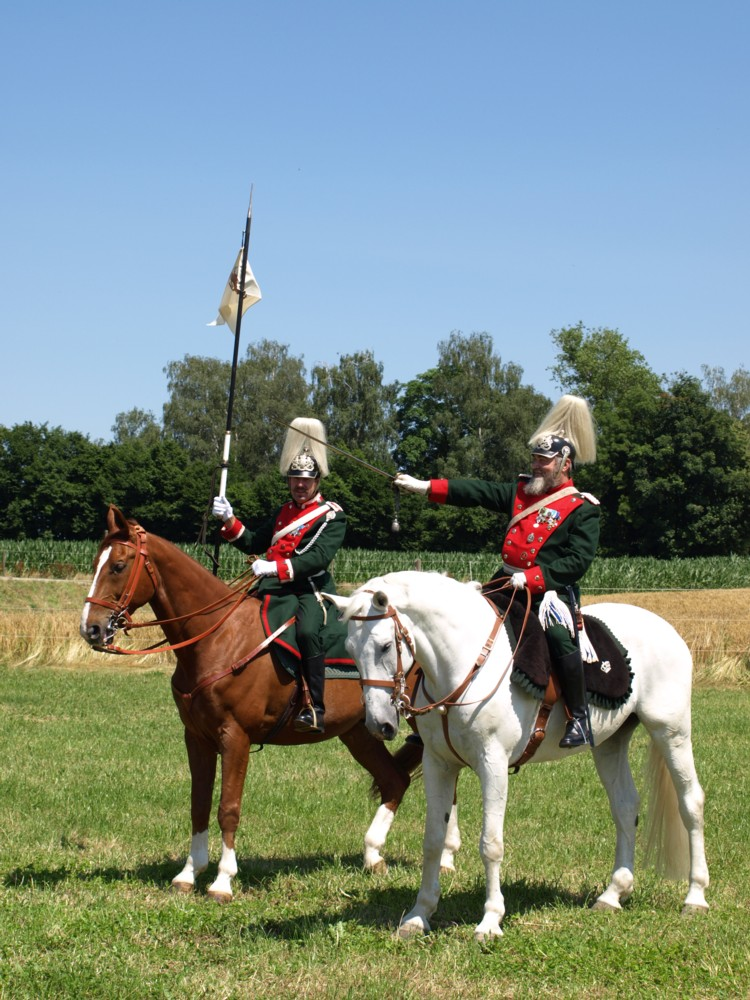 Major und Sergeant des KB 4. Cheveuleager-Regiments